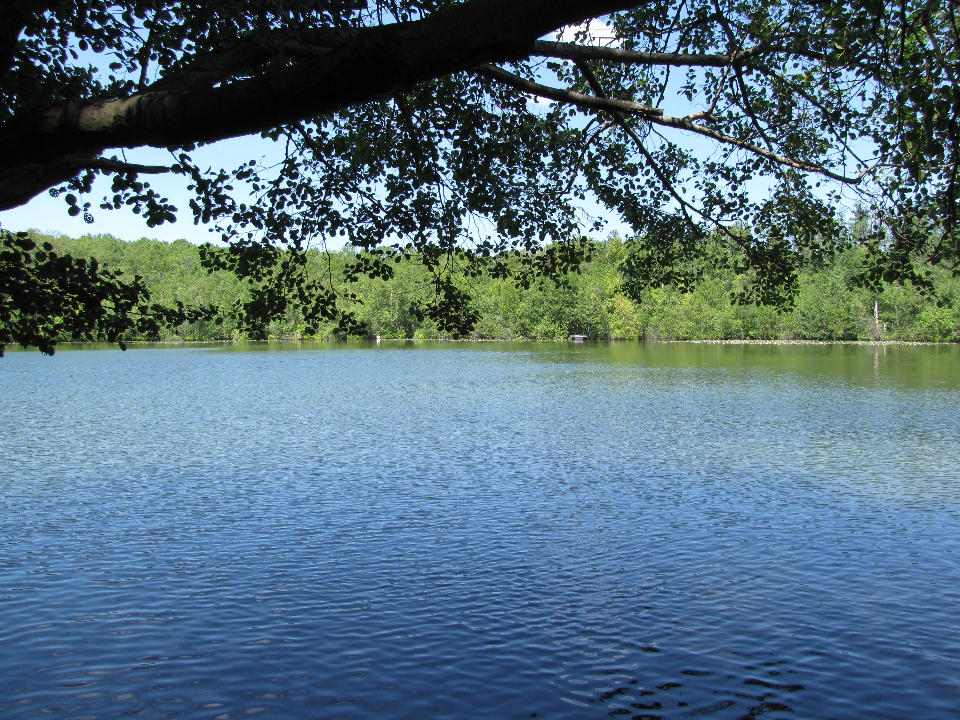 Großer Zeschsee bei Zesch am See, Ortsteil Lindenbrück, Stadt Zossen, Brandenburg, Deutschland